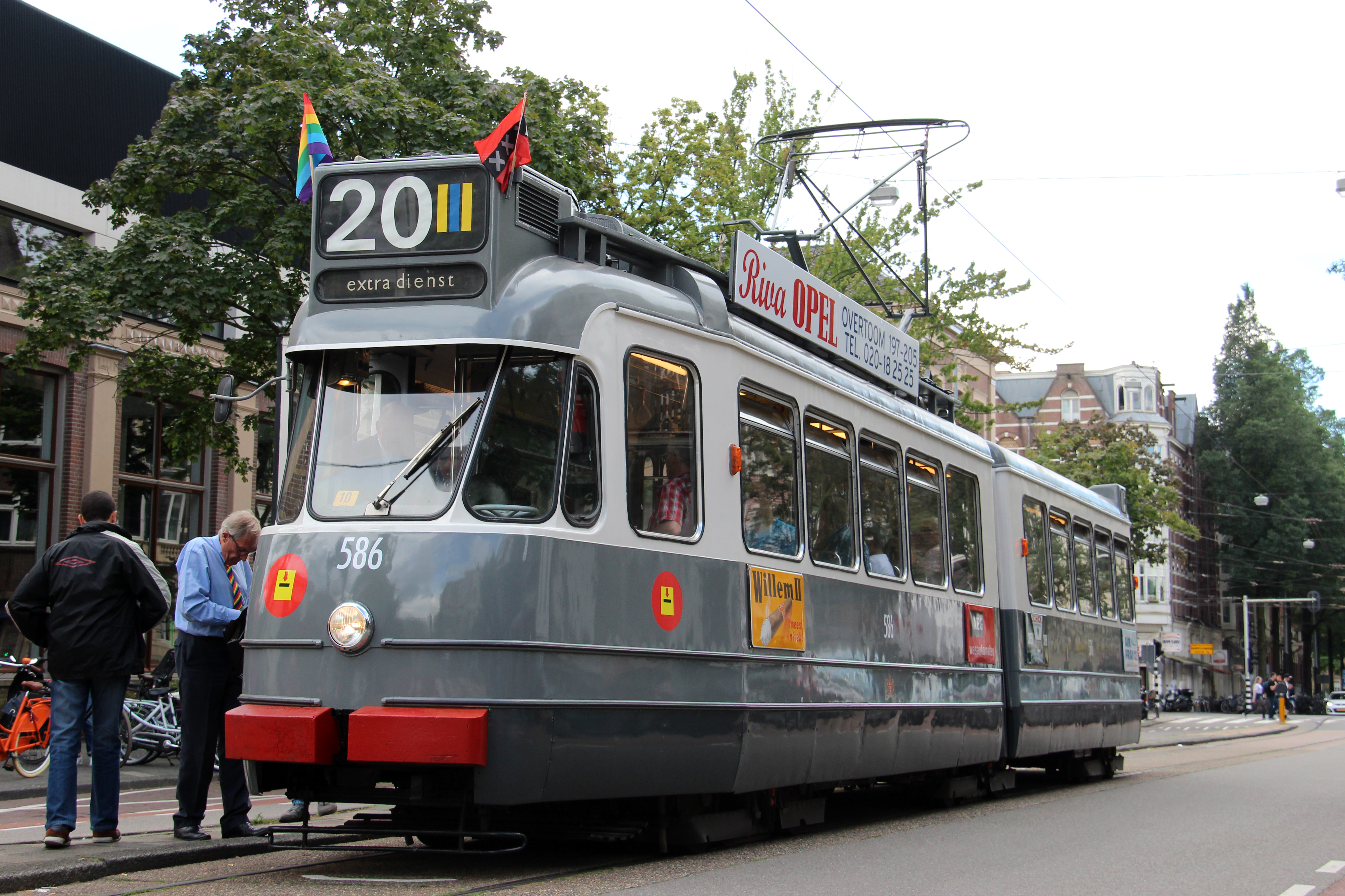 Afbeelding van de buiten of binnenkant van de GVB 586 (type 2G) van de Elektrische Museumtramlijn Amsterdam tijdens een toeristische rondrit door Amsterdam.